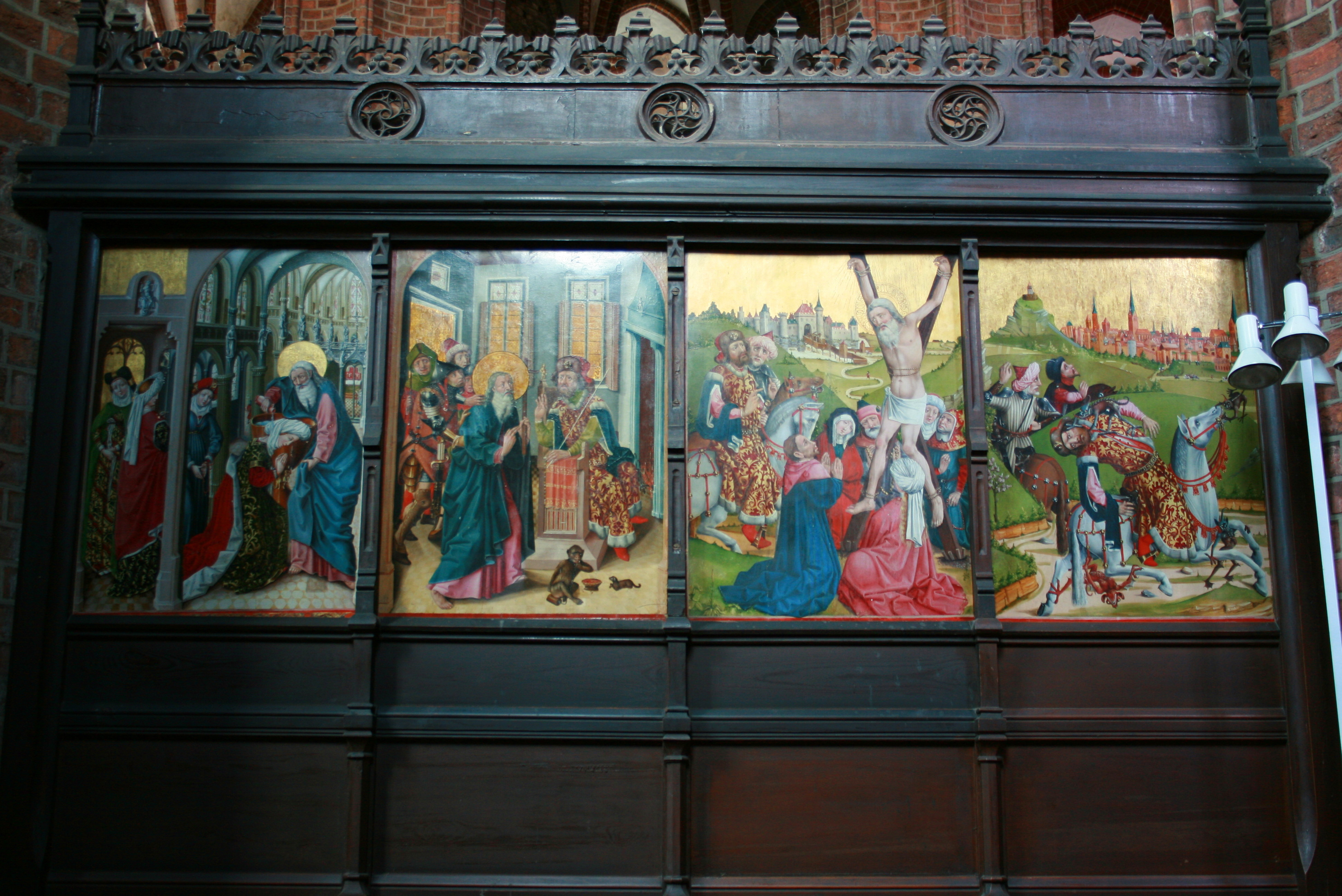 Reste des Hochaltars aus dem aufgegebenen Kloster Heiligenthal bei Lüneburg